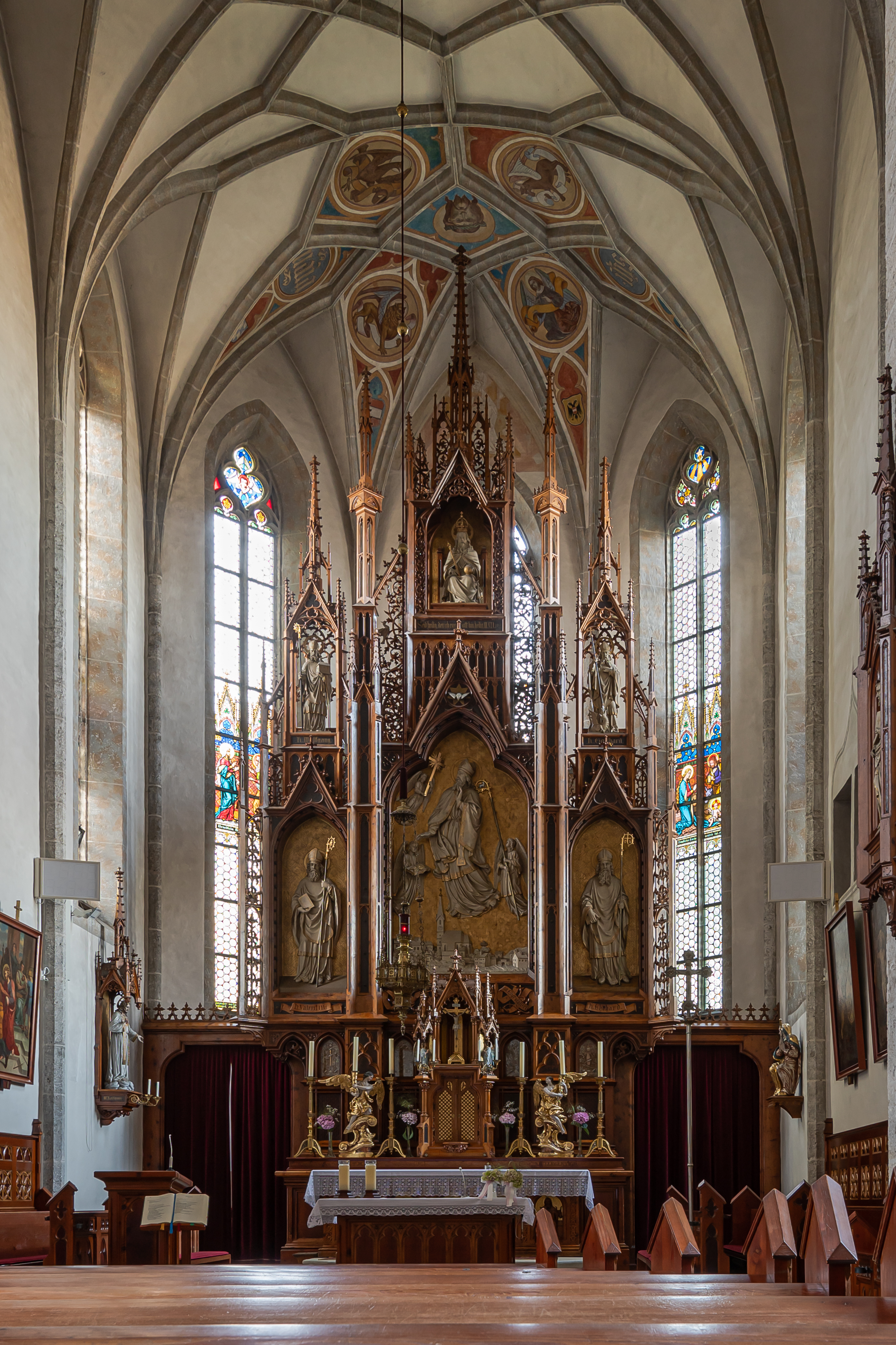 Die neugotische Einrichtung der Kath. Pfarrkirche hl. Ulrich in Eberstalzell stammt aus der Zeit um 1880.